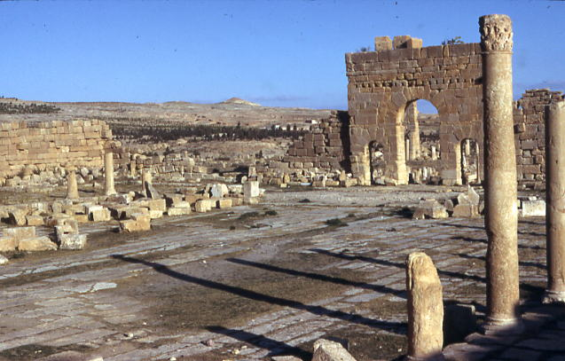 Ruines romaines de Sbeitla, Tunisie